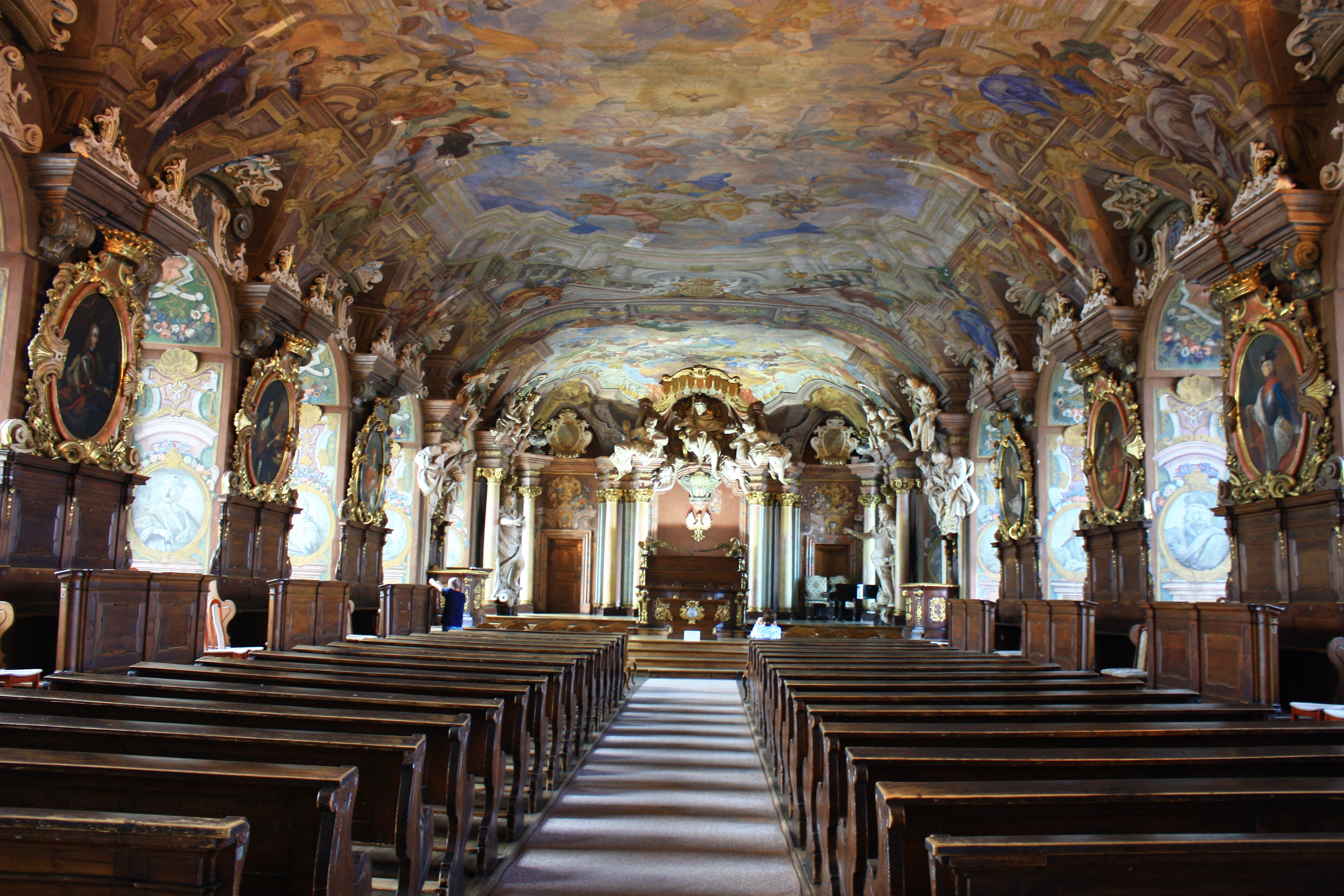 Wrocław, kolegium jezuickie, ob. Uniwersytet Wrocławski